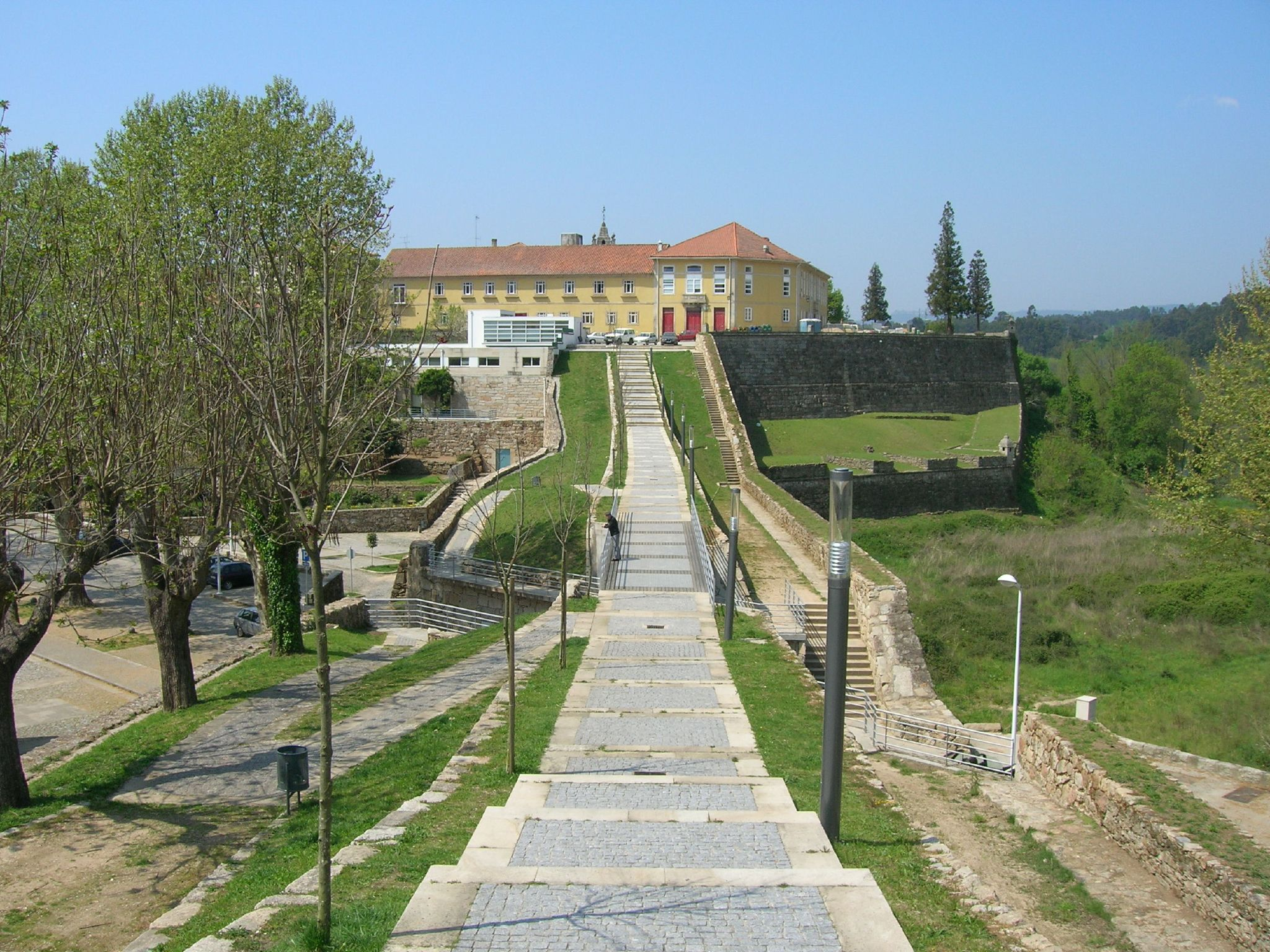 Muros da fortificação de Monção